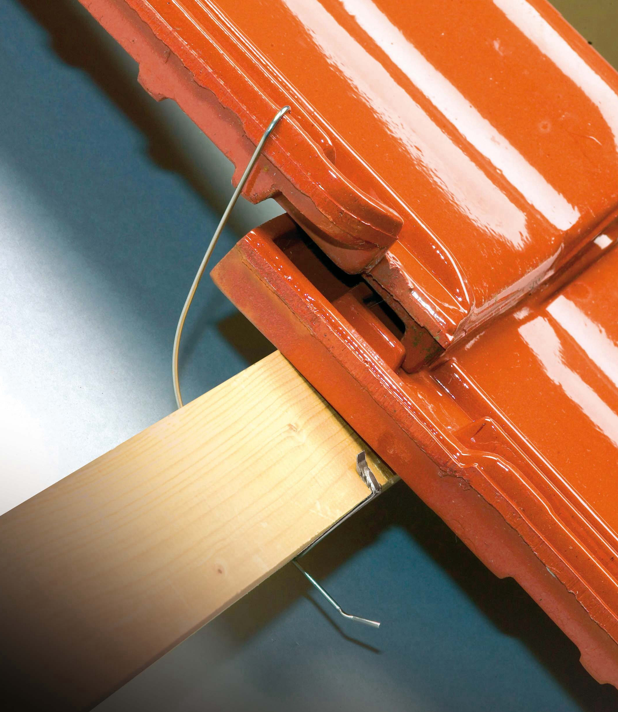 Windsog-Sicherungssystem